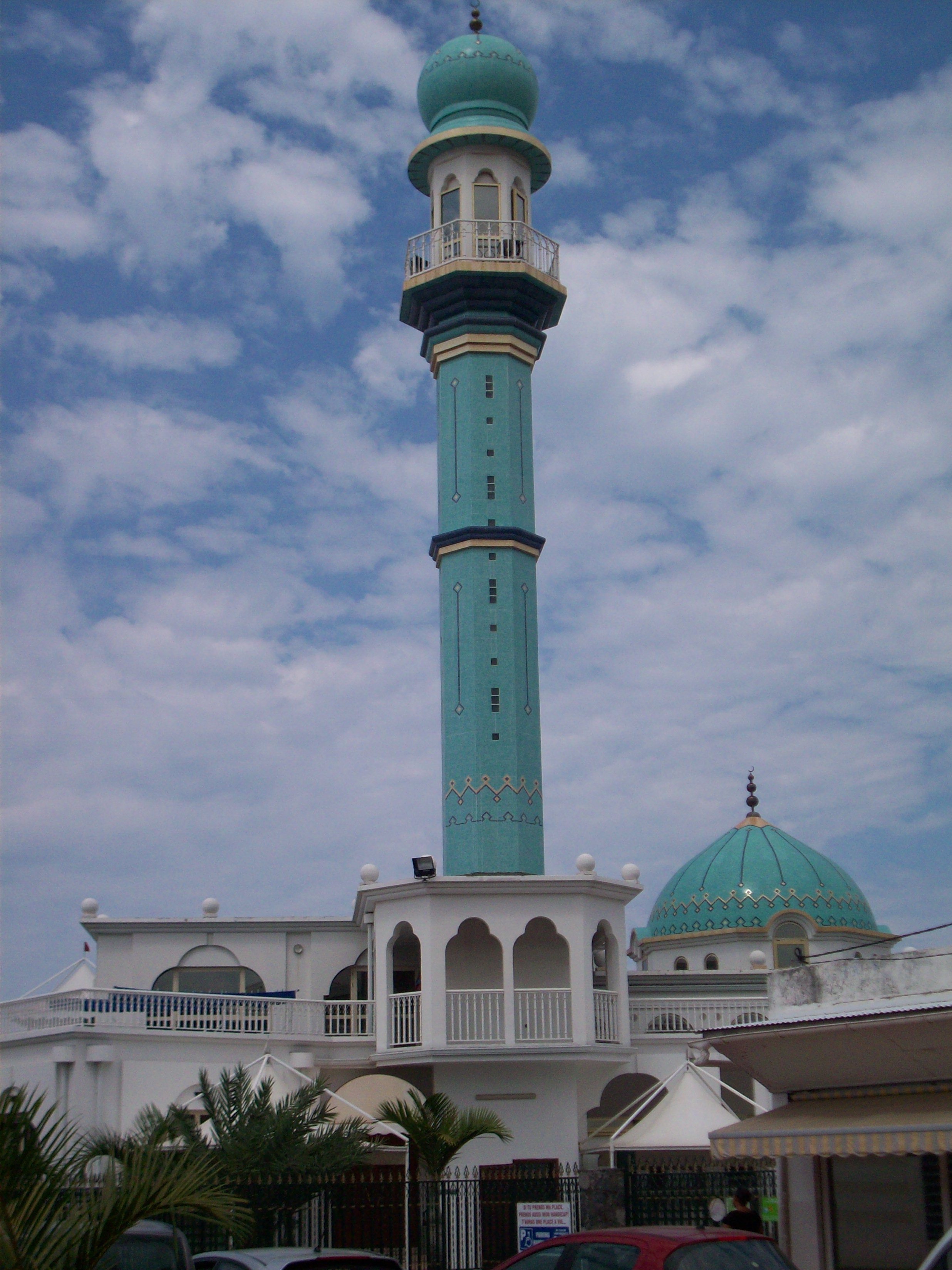 Vue extérieure de la Mosquée